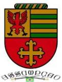 Brasão de Armas da Família Assumpção